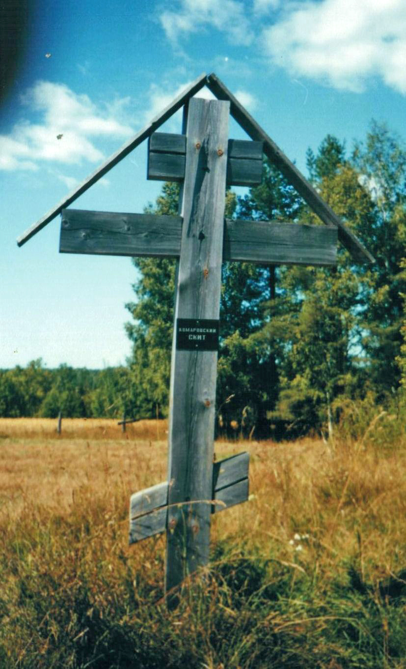 Komarov skit of Old Believers